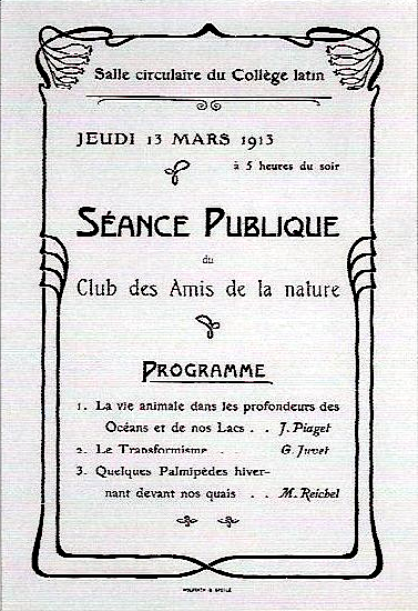 Invitation à une « séance publique du Club des Amis de la nature », le jeudi 13 mars 1913 (à Neuchâtel). Trois orateurs sont prévus : Jean Piaget sur « La vie animale dans les profondeurs des Océans et de nos Lacs », Gustave Juvet sur « Le Transformisme » et M. Reichel sur « Quelques Palmipèdes hivernant devant nos quais ».